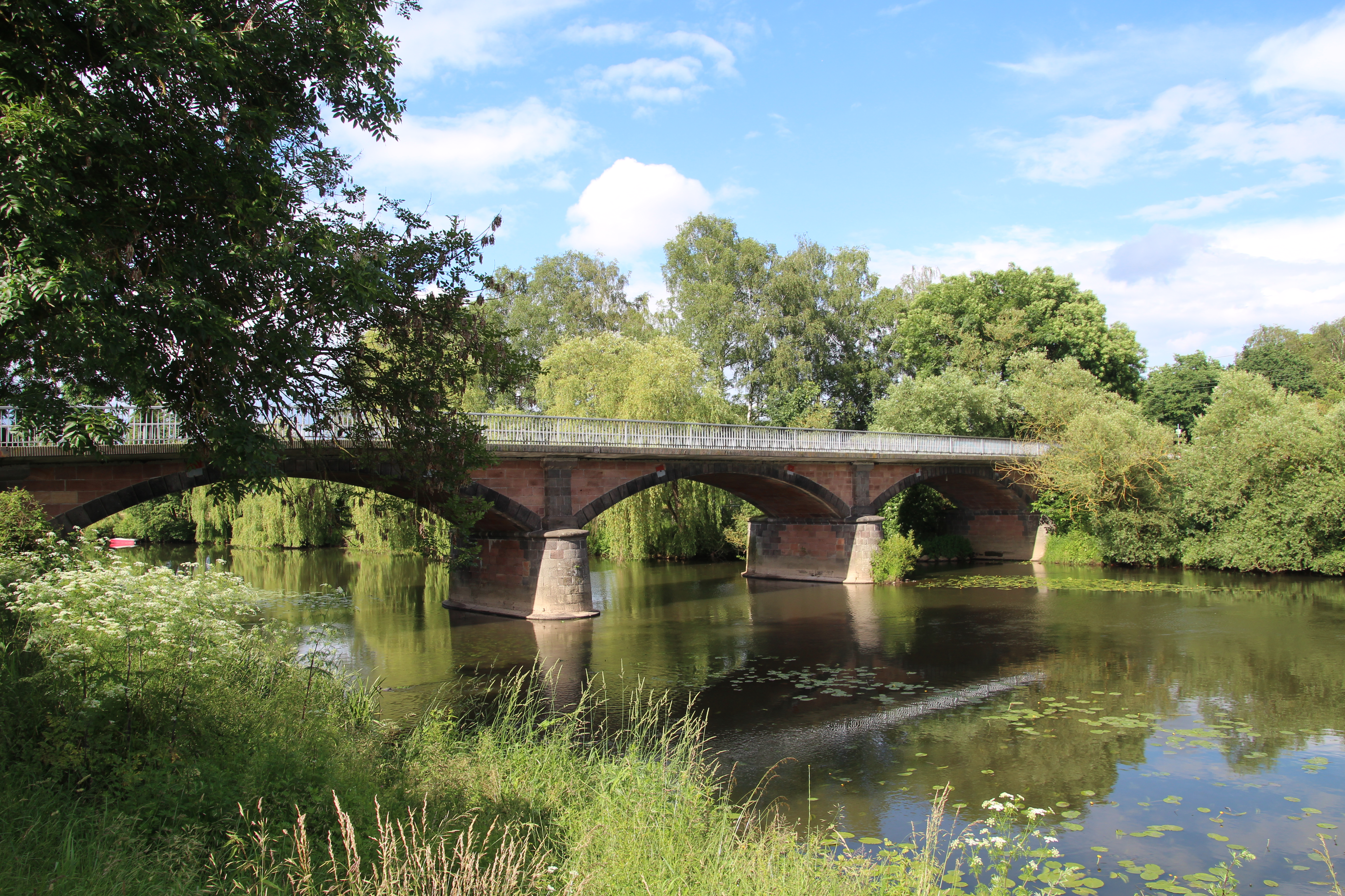 Lahnbrücke